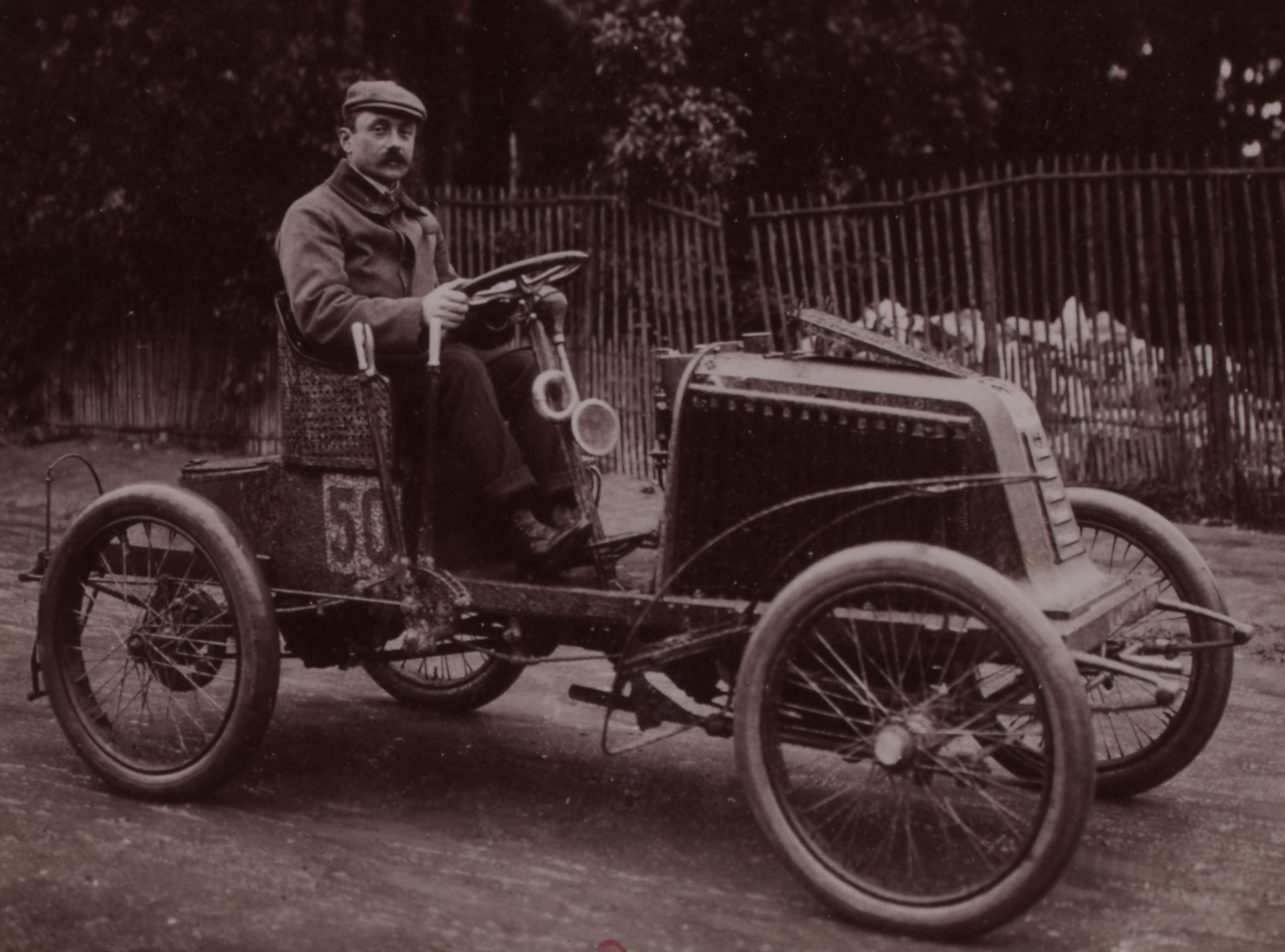 [Collection Jules Beau. Photographie sportive] : T. 17. Année 1902 / Jules Beau : F. 46. Cormier, voiturette Renault ; Grus